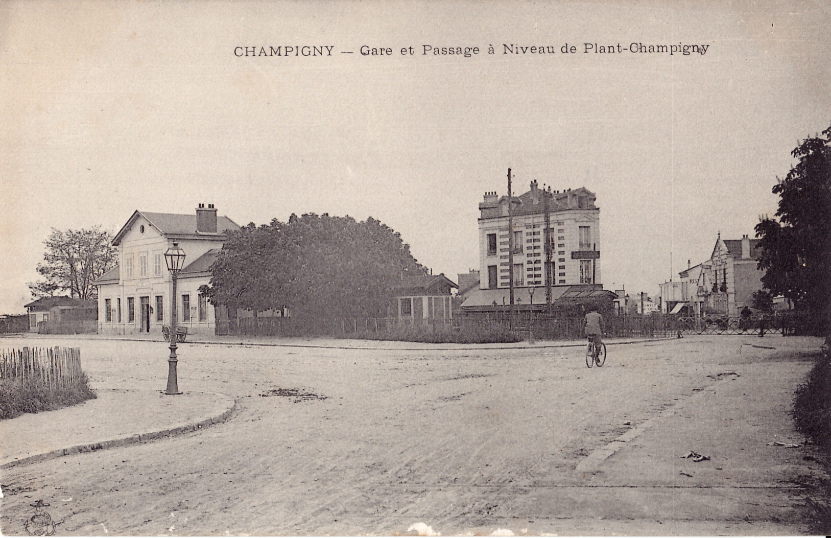 Carte postale ancienne éditée par Ancre : CHAMPIGNY - Gare et passage à niveau de Plant-Champigny